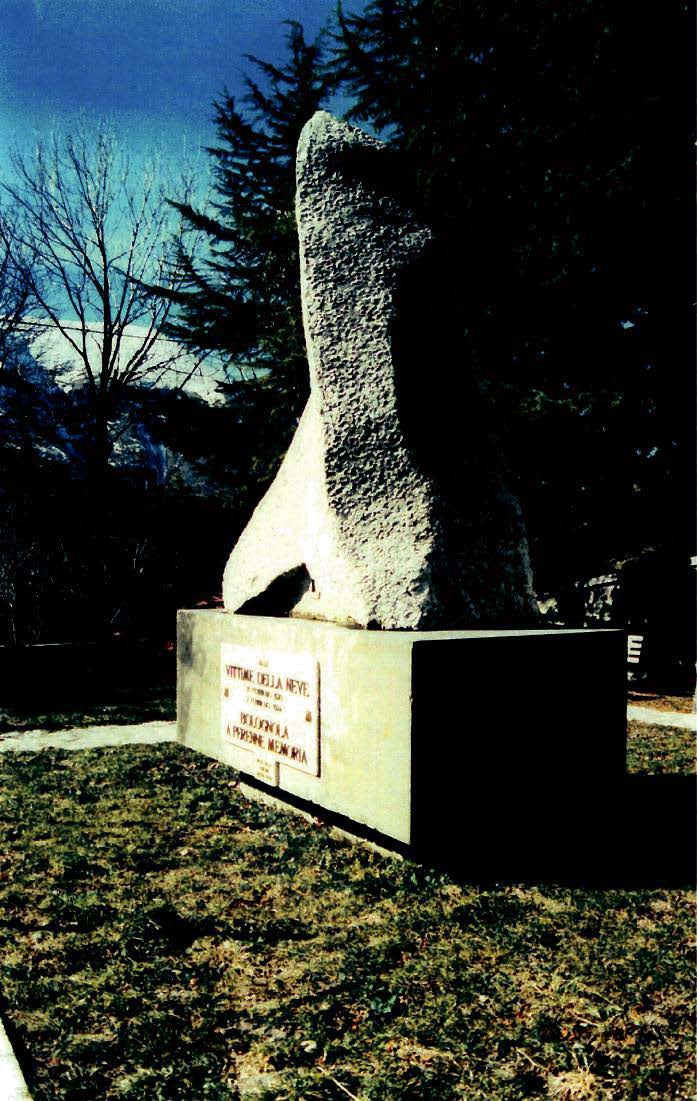 Monumento commemorativo alle vittime della neve Bolognola (Marche) - 1980